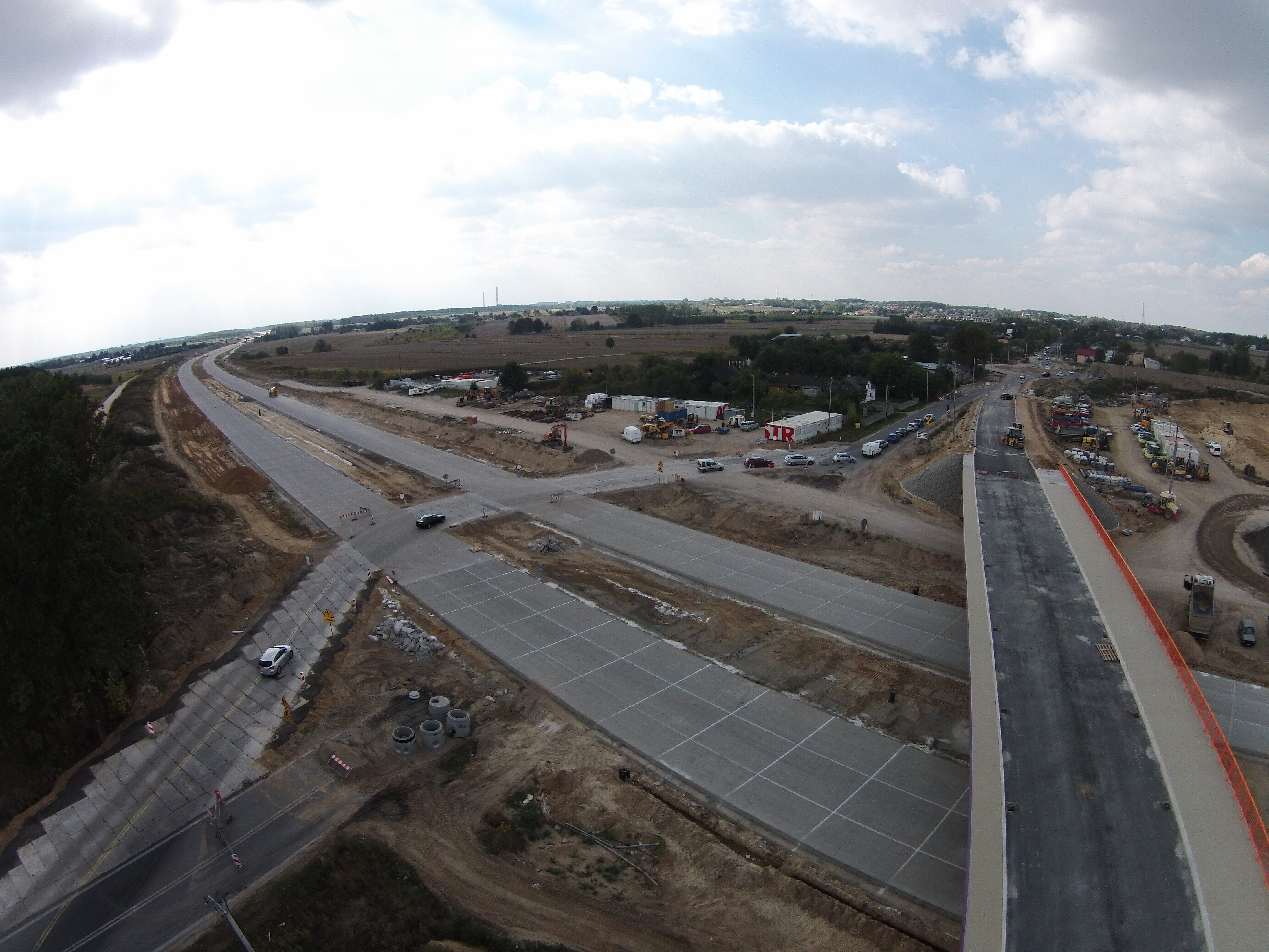 Nowy wiadukt autostradowy powstał nad budowaną autostradą A1 w Łodzi na ul. Brzezińskiej